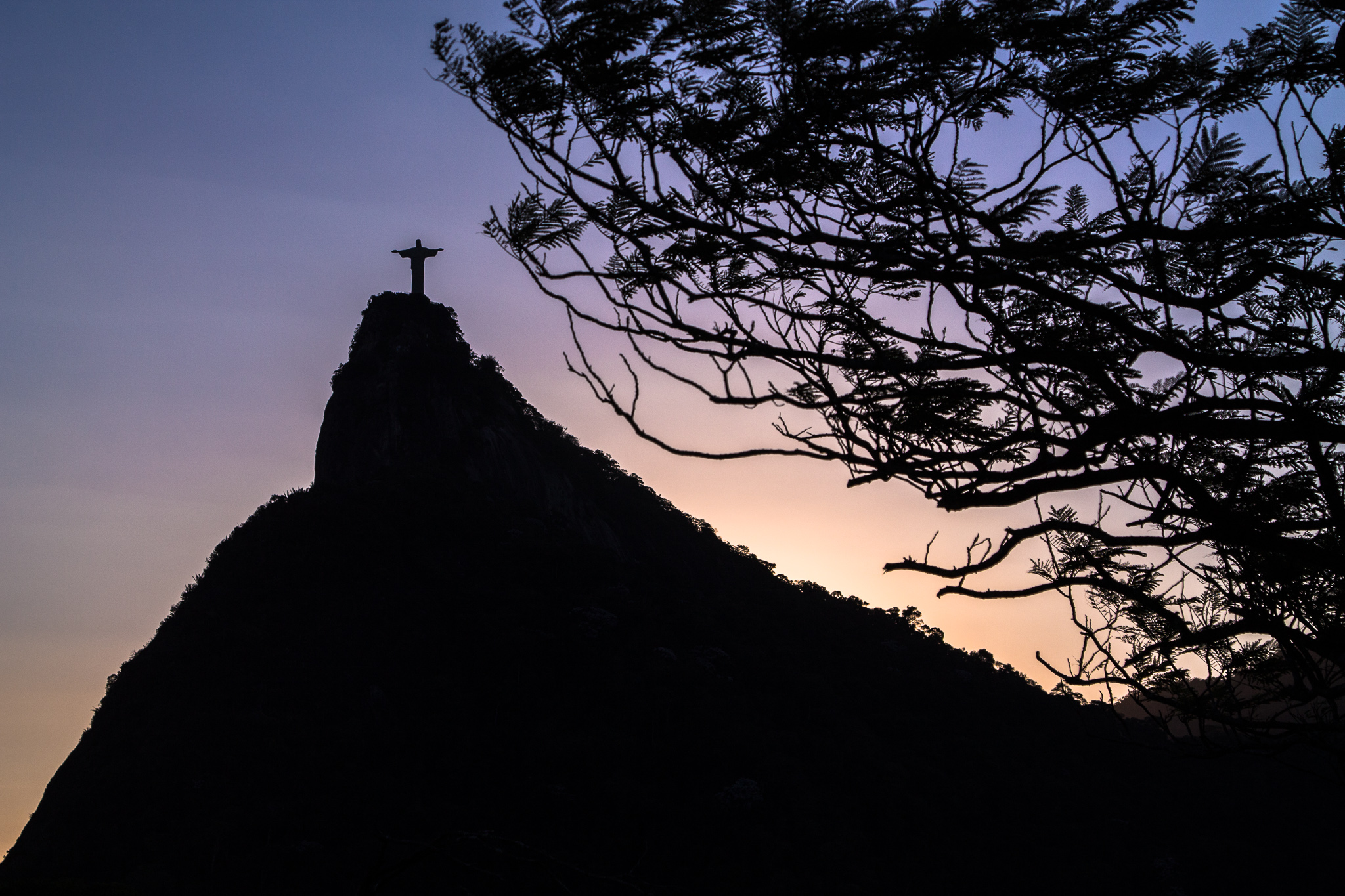 Cristo Redentor, estátua erigida no Penhasco do Corcovado.